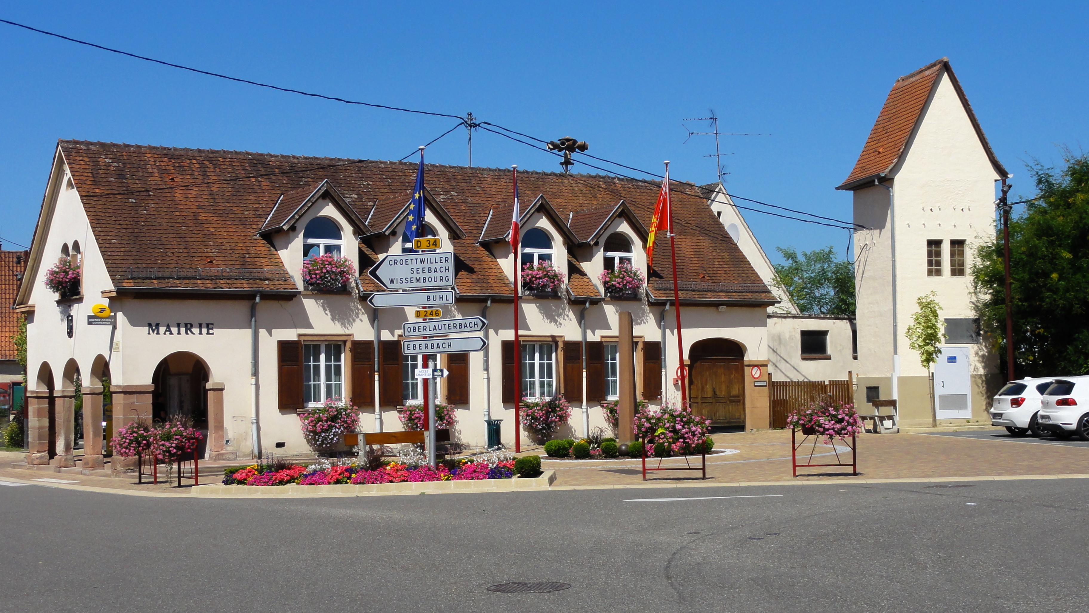 Alsace, Bas-Rhin, Niederrœdern, Mairie.